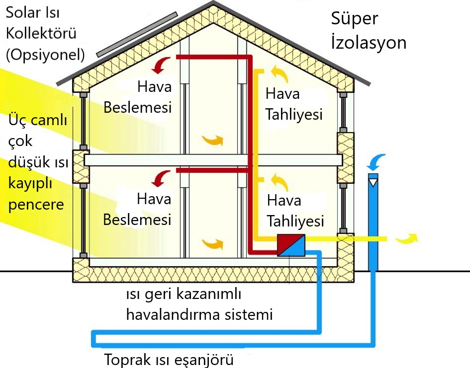 Passivhaus kesit görünümü